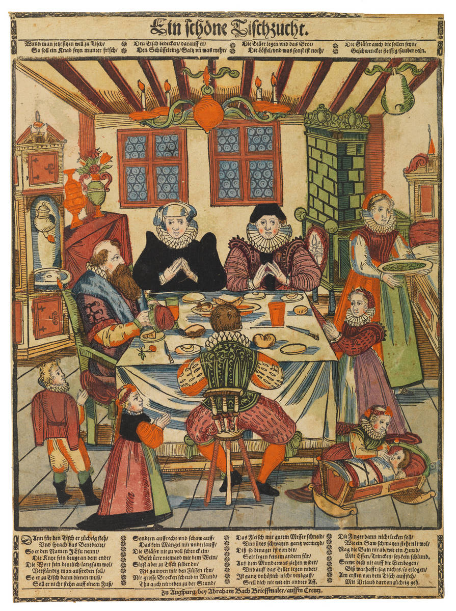 Ein schöne Tischzucht (Augsburger Bürgerfamilie bei Tisch). Kolorierter Holzschnitt von Abraham Bach, Augsburg um 1680 (Staatsbibliothek Bamberg, VI G 155)